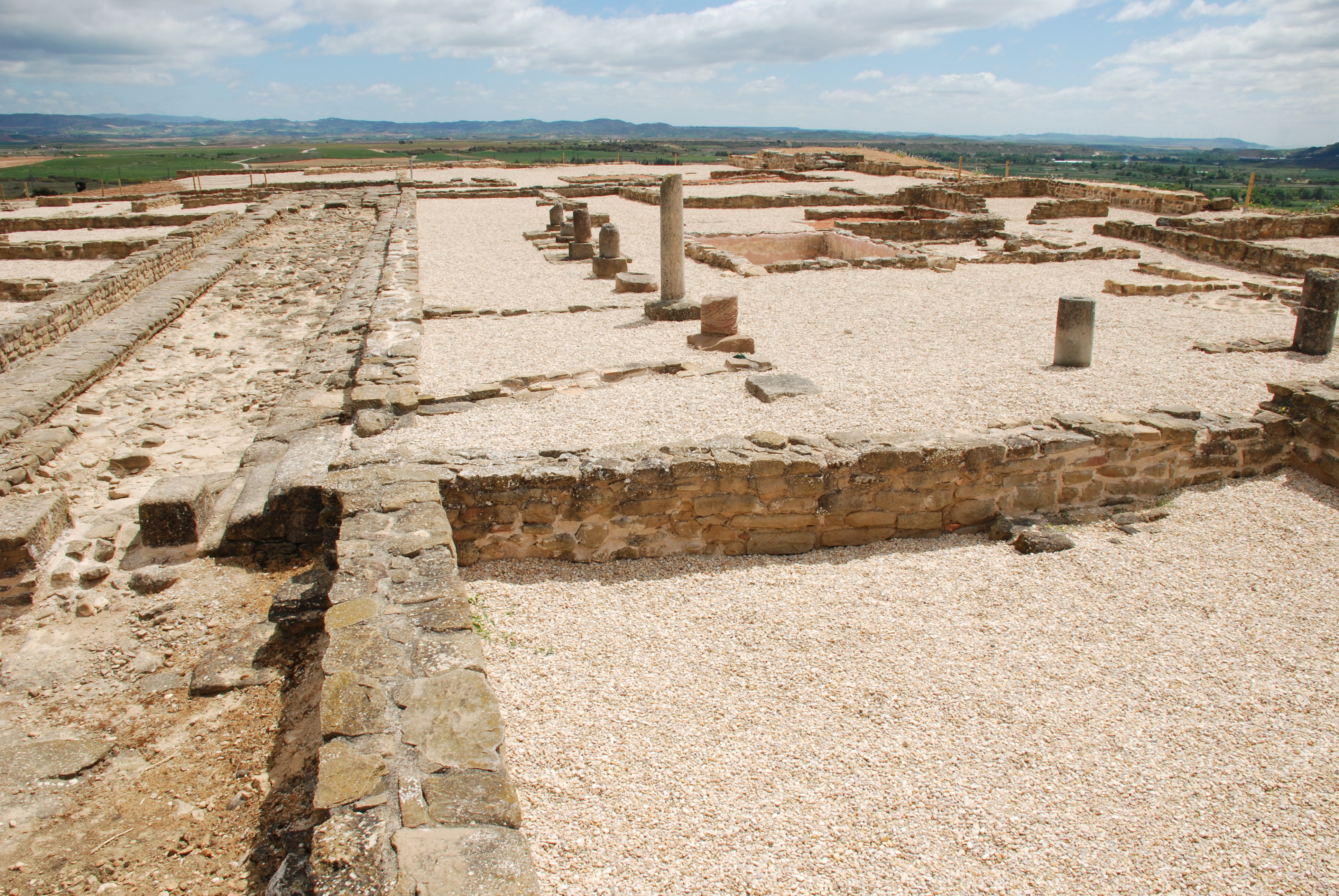 Ruinas romanas de Andelos, Navarra